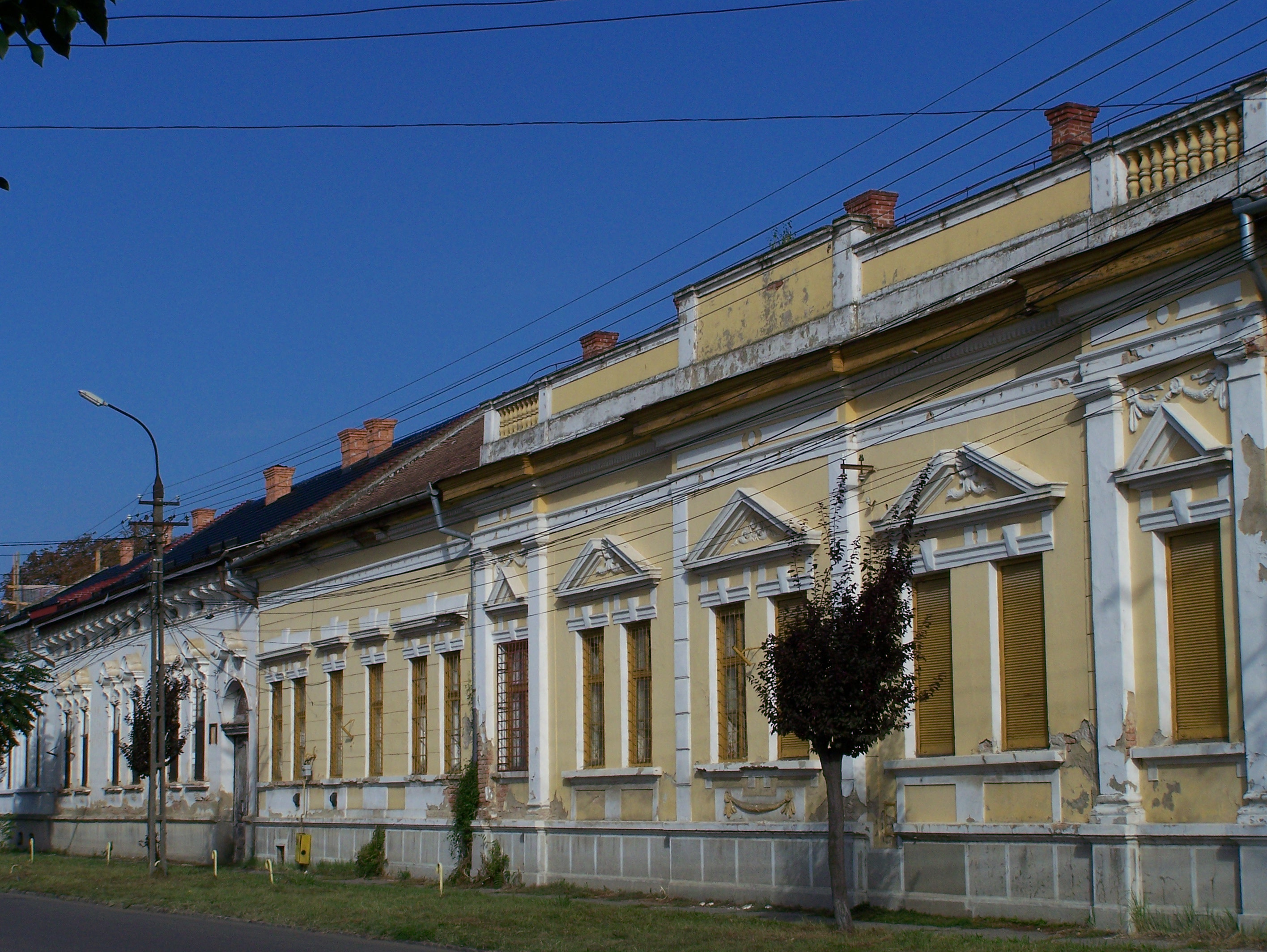 Ansamblul urban „Strada Culturii”